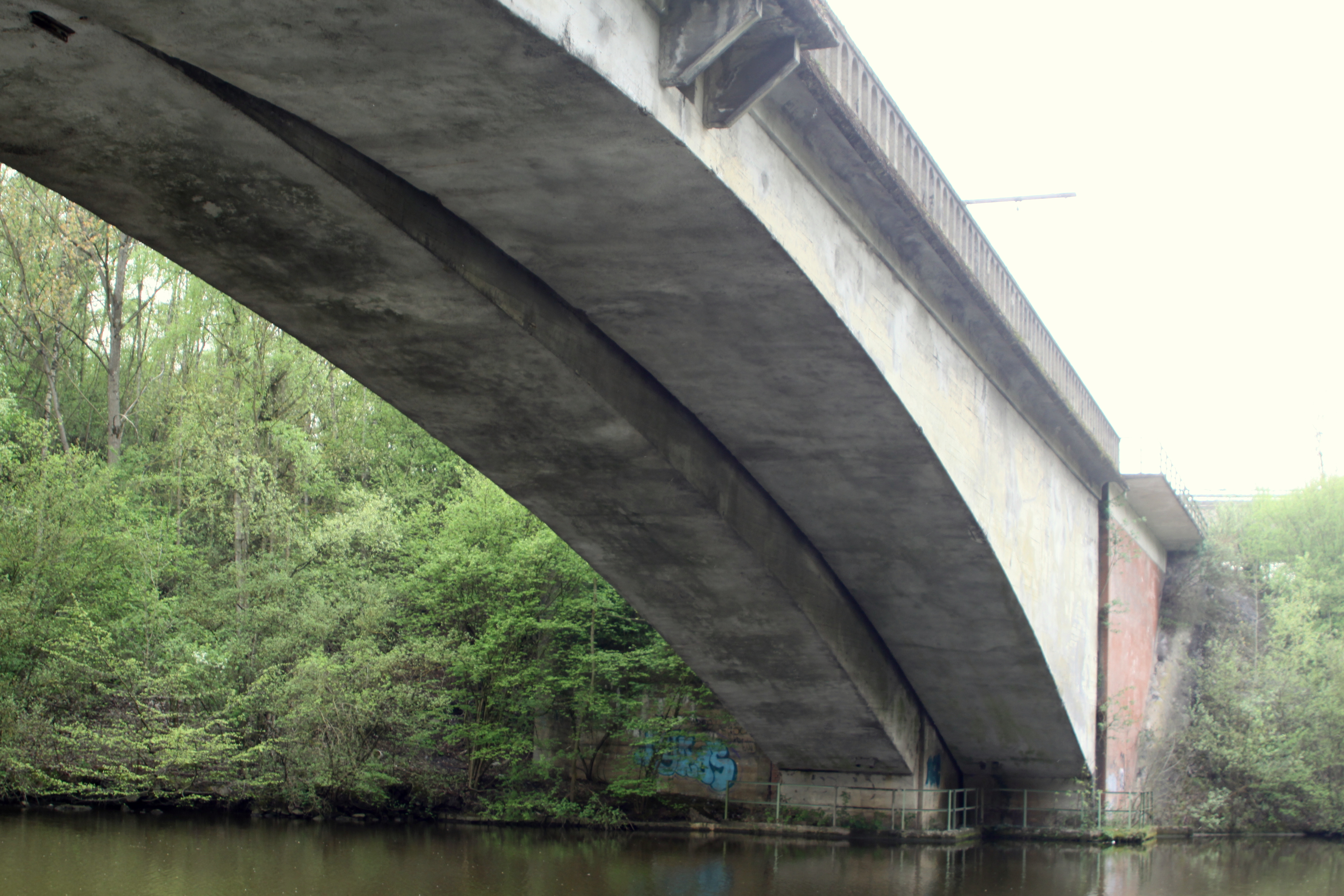 Déi zwéi versate Béi